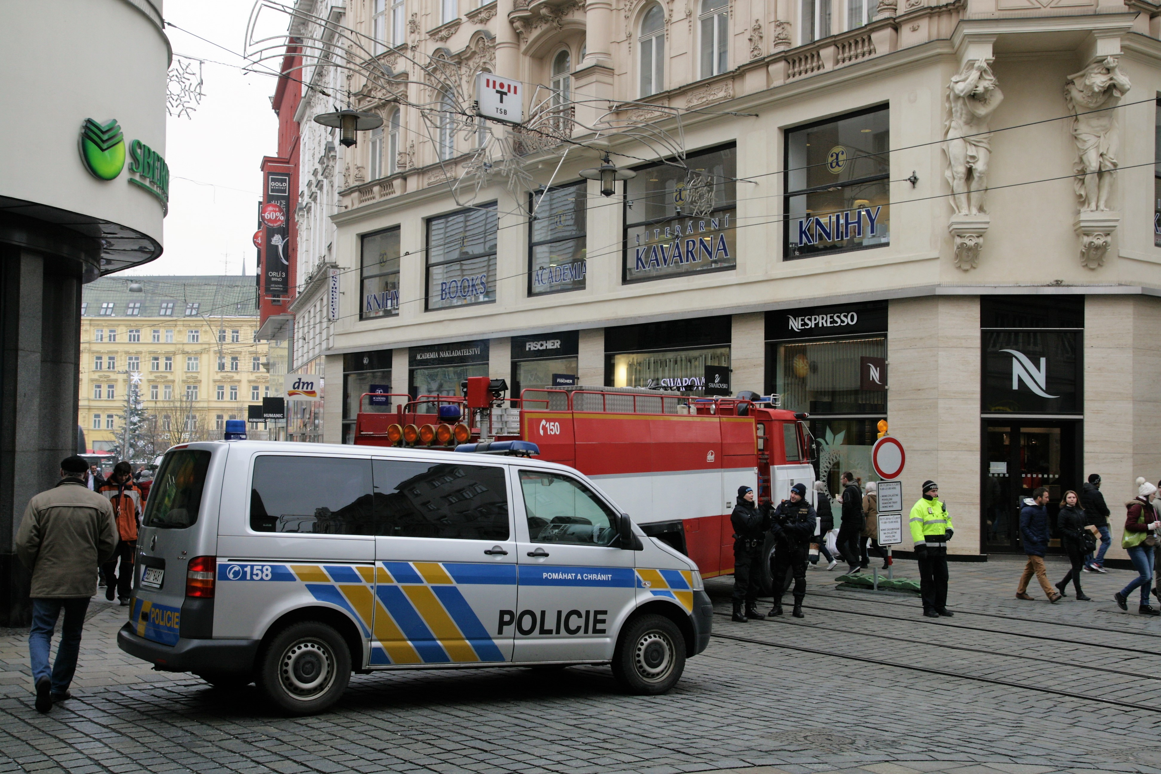 Brněnské Vánoce - vánoční trhy na náměstí Svobody. Policejní zátaras s požární cisternou v Masarykově ulici v rámci zpřísněných bezpečnostních opatření po útoku na berlínské vánoční trhy.